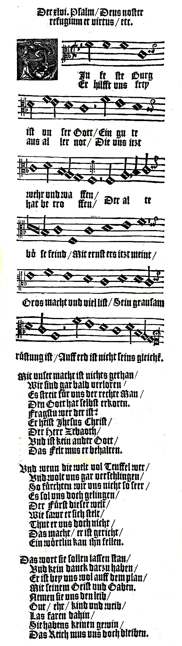 Ein feste Burg ist unser Gott als Lied zum ersten Fastensonntag in Johann Spangenbergs Gesangbuch, Magdeburg 1545